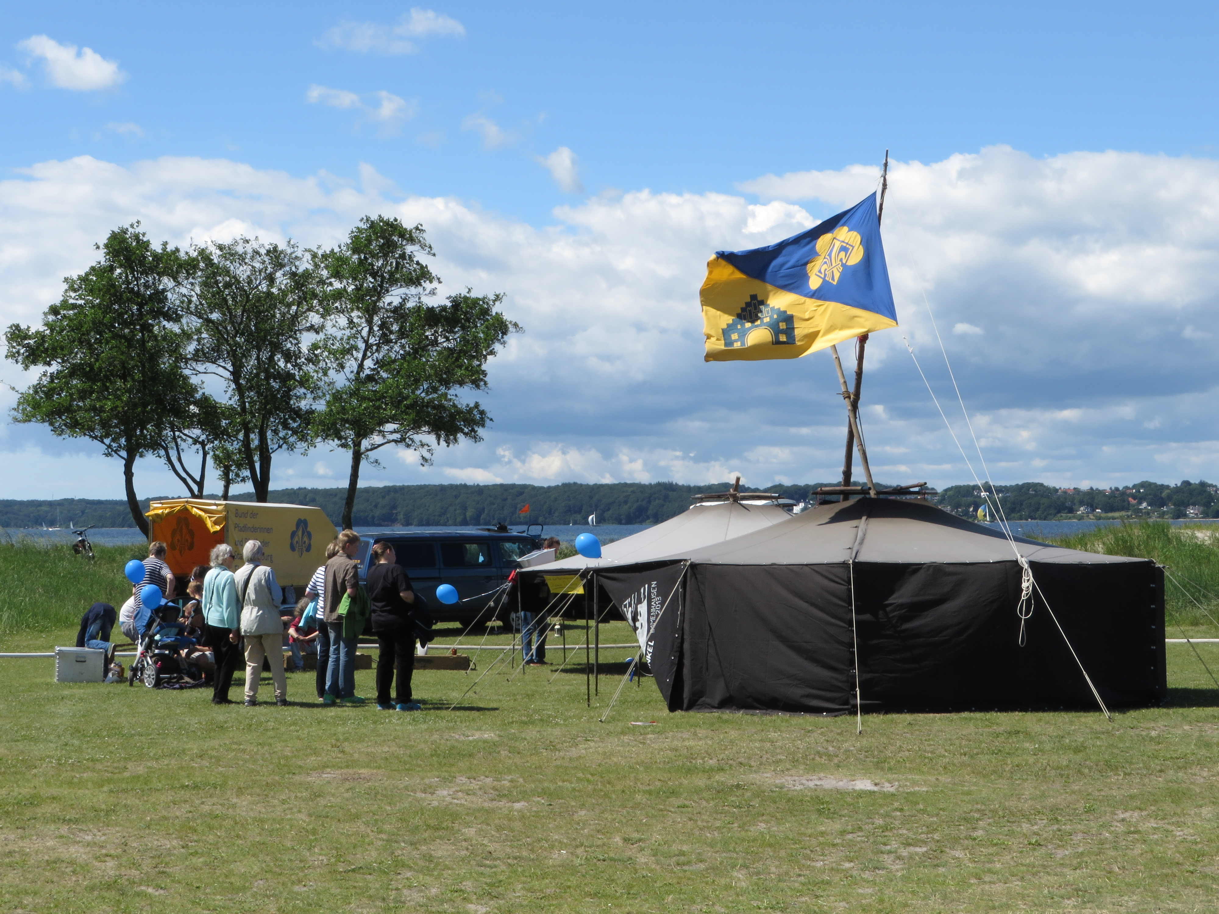 Solitüdefest (Flensburg-Mürwik Juni 2014), Bild 08